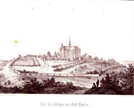 Mont-Saint-Eloi - Vue au XIV ème siécle